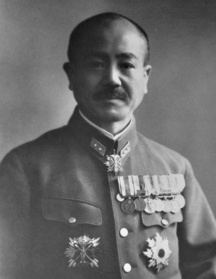 高木義人（1886-1956）